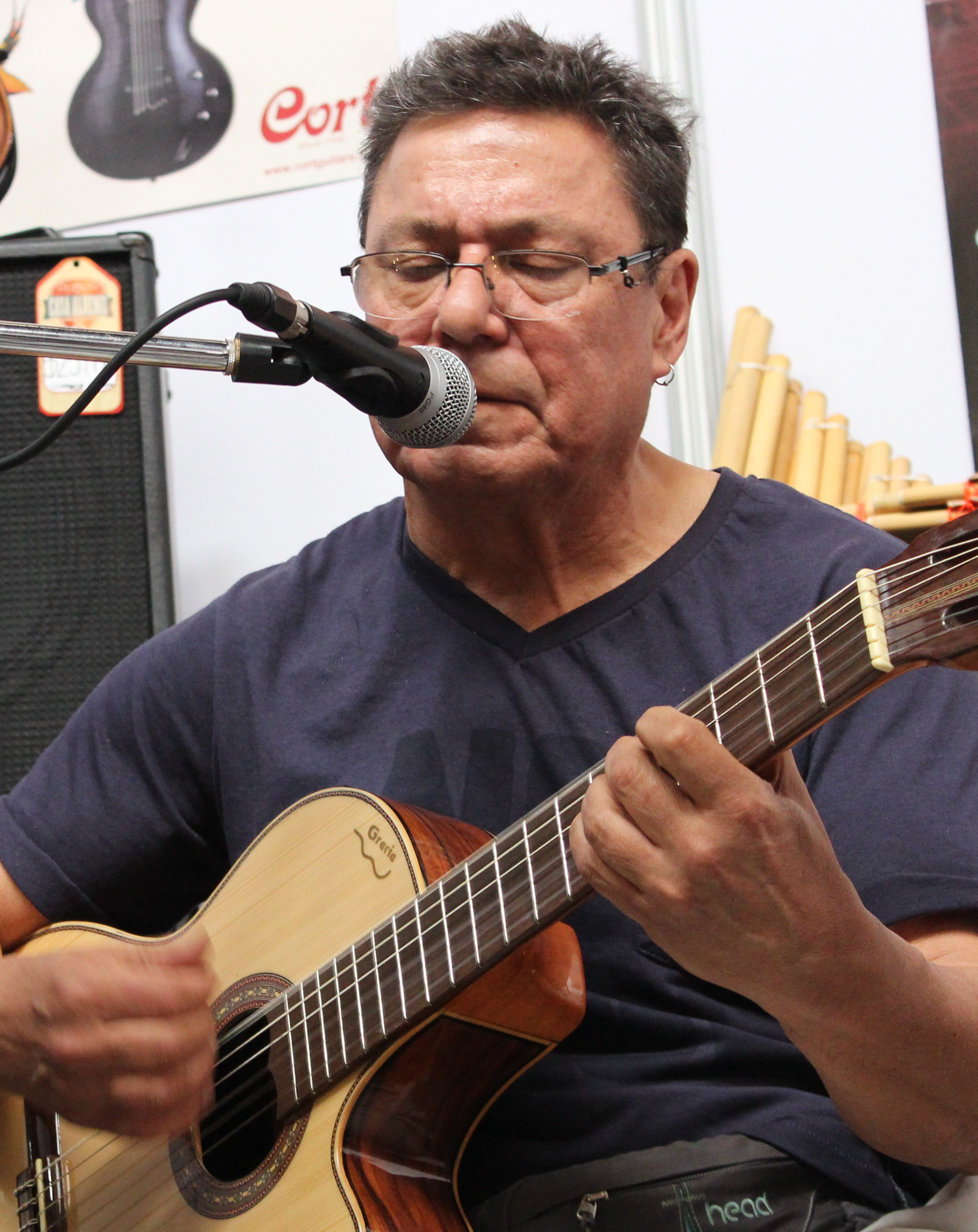 José Seves presentándose en la Feria Pulsar 2014